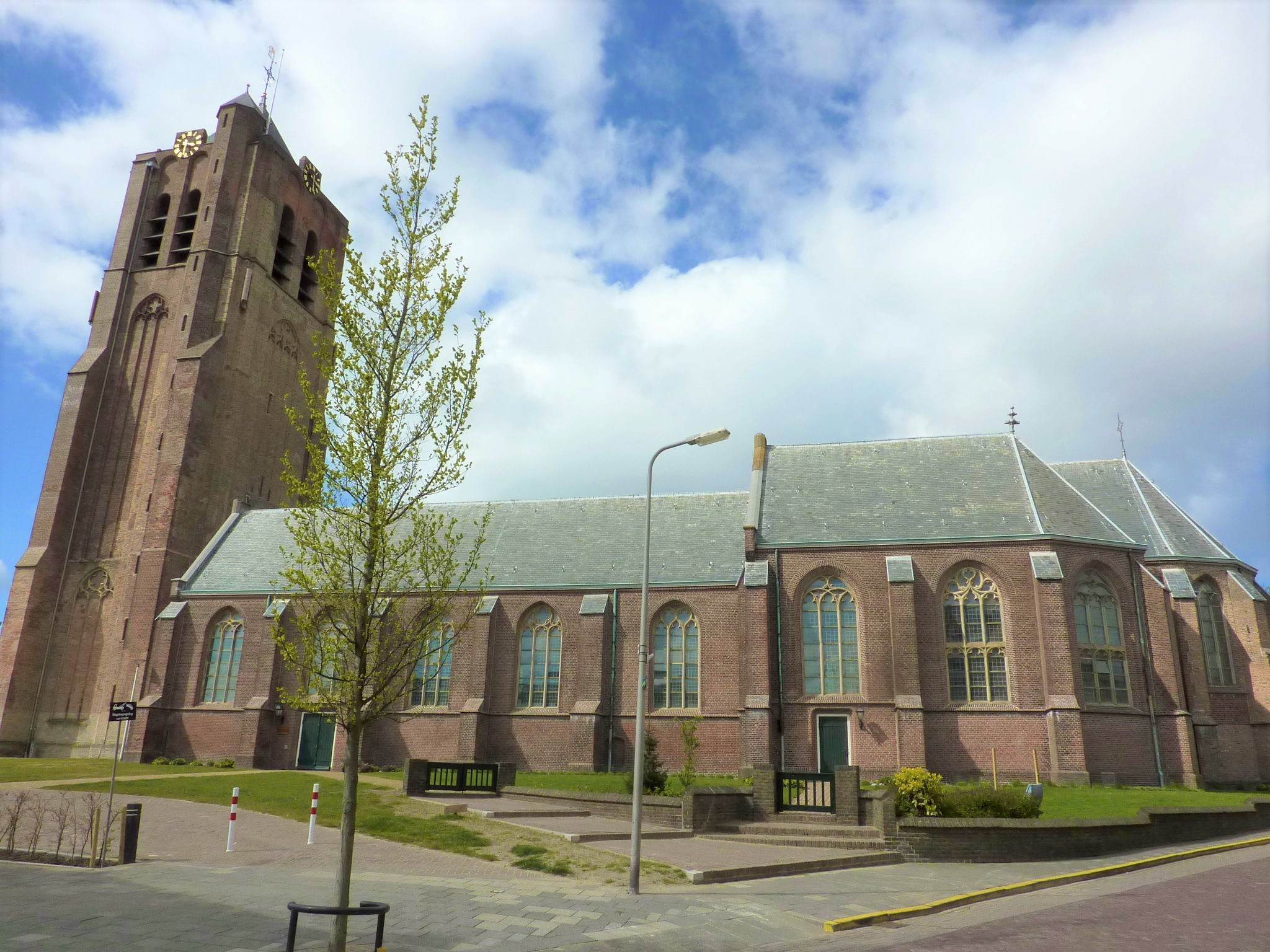 Grote Kerk (Monster)